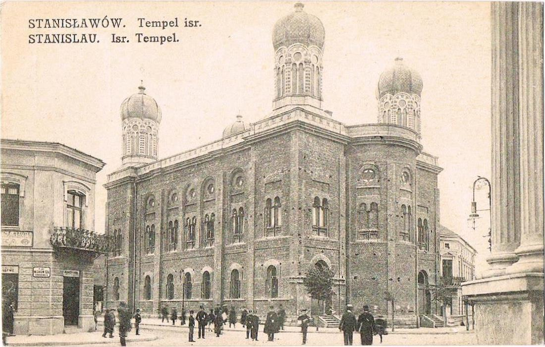 Tempel (Synagogue) in Stanisławów, Galizia, today Iwano Frankiwisk, Ukraine.